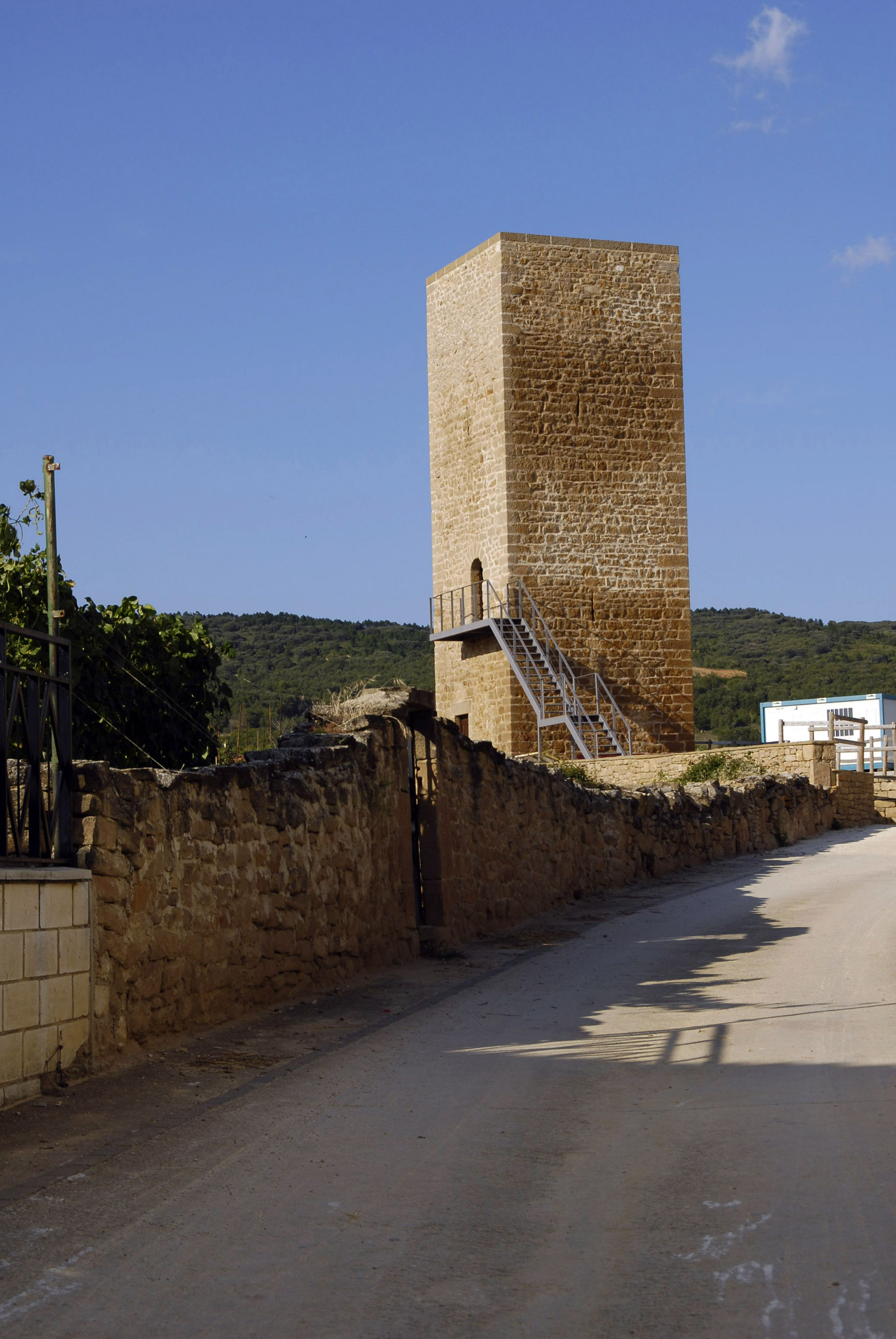 Torre Arellano Navarra